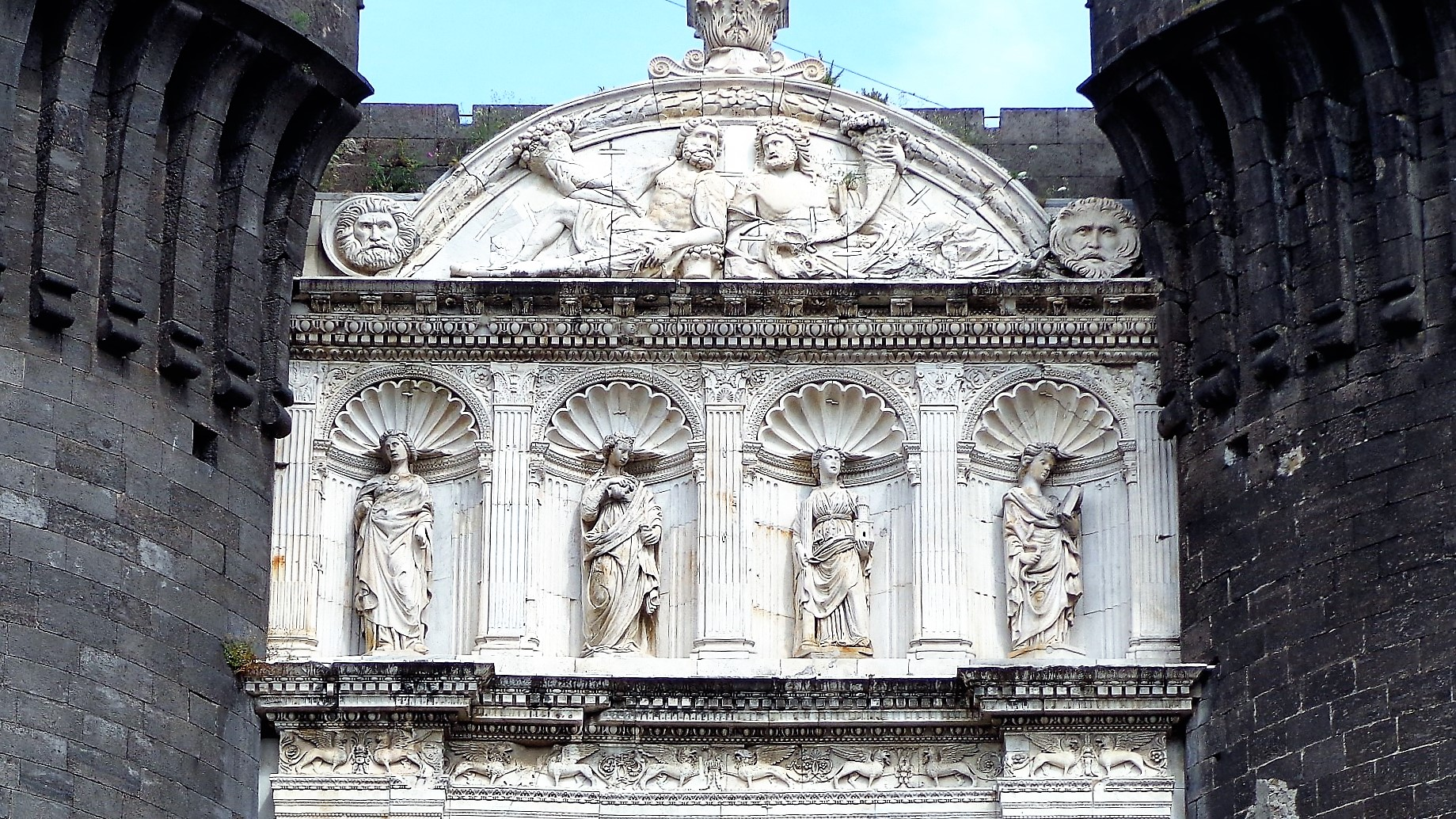 Prospetto sommitale arco Maschio Angioino, statua del Gagini